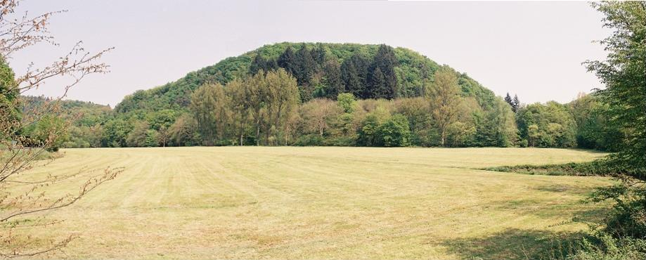 Rennenberg